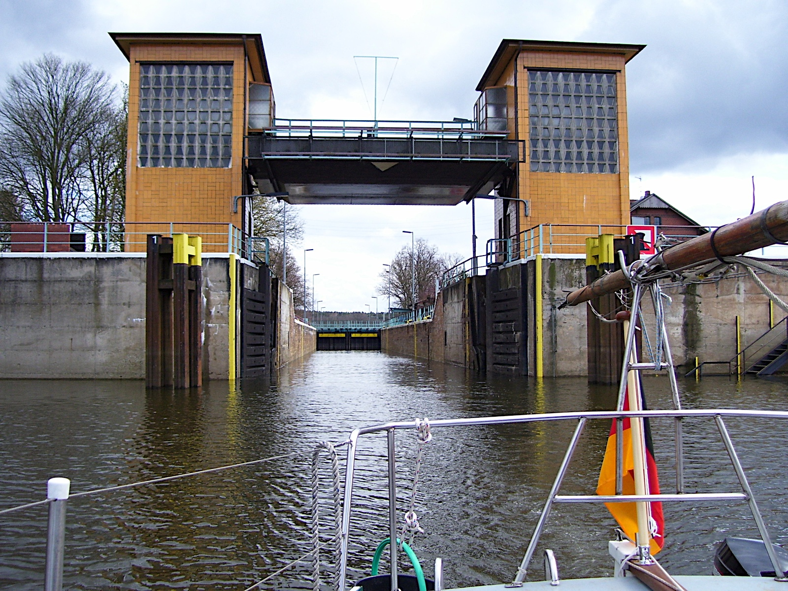 Parey, Sachsen-Anhalt, Schleuse, Aufnahme der Schleuse Parey mit gehobenem Tor bei der Ausfahrt in Richtung Elbe